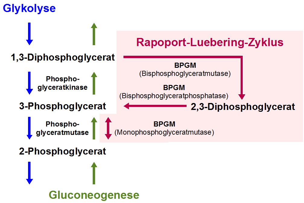 Schematische Darstellung des Rapoport-Luebering-Zyklus, eines Nebenwegs der Glykolyse in den Erythrozyten